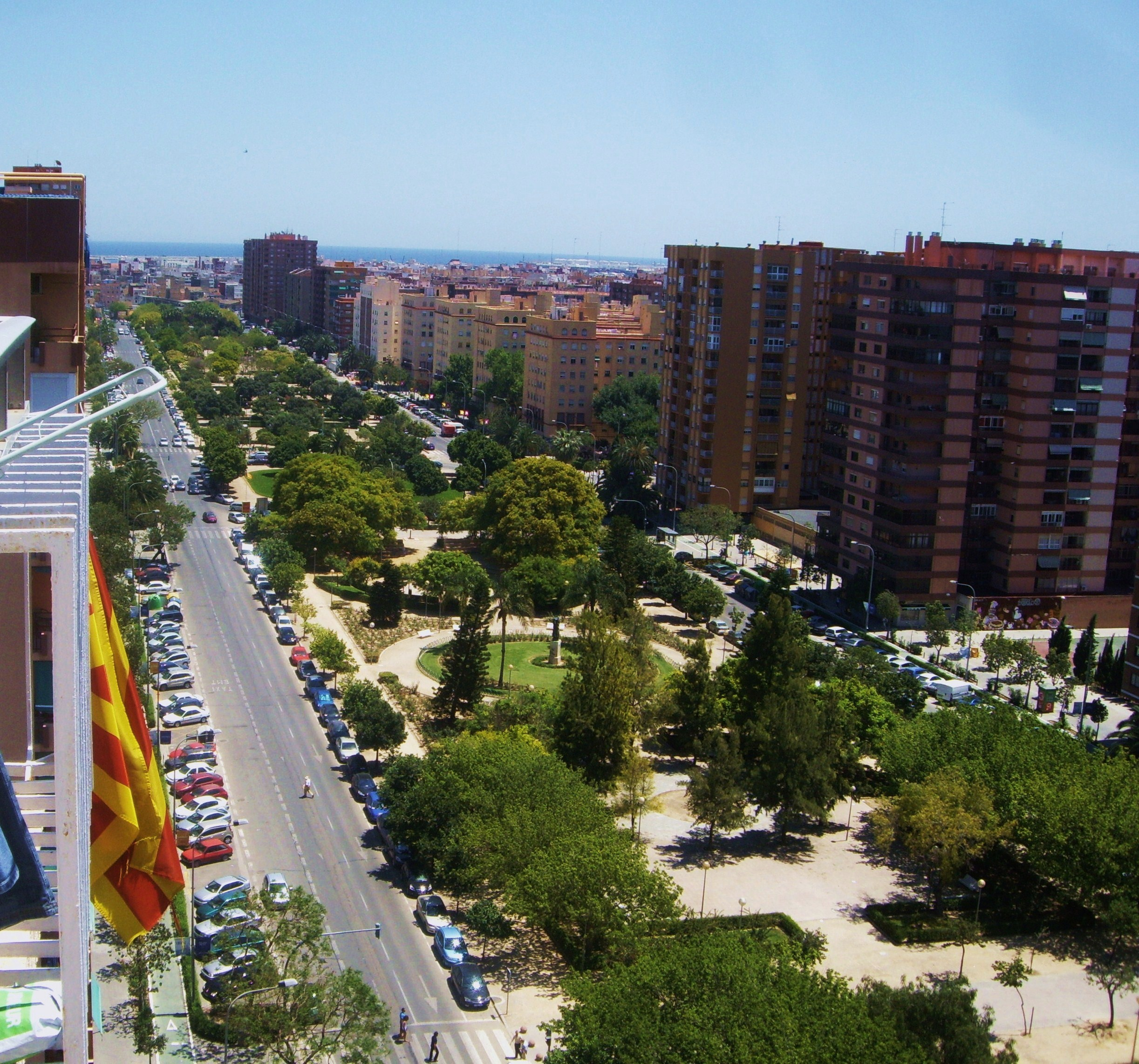 Avinguda de Vicent Blasco Ibáñez des d'un catorzé pis.